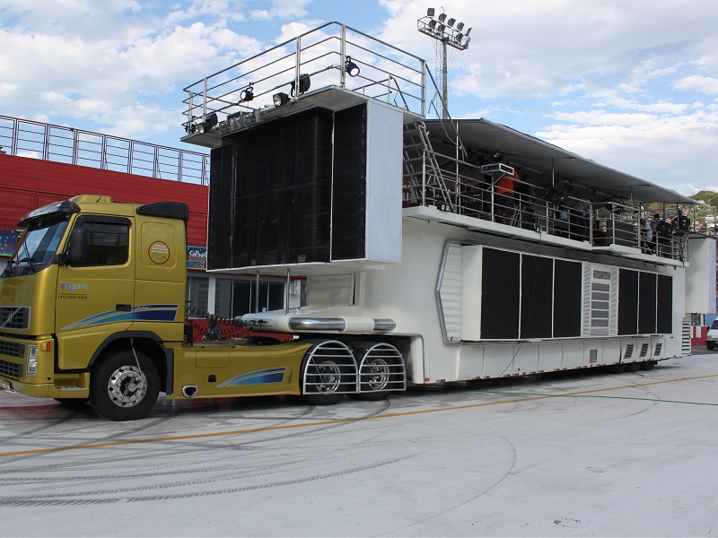 Curitiba, 2015.